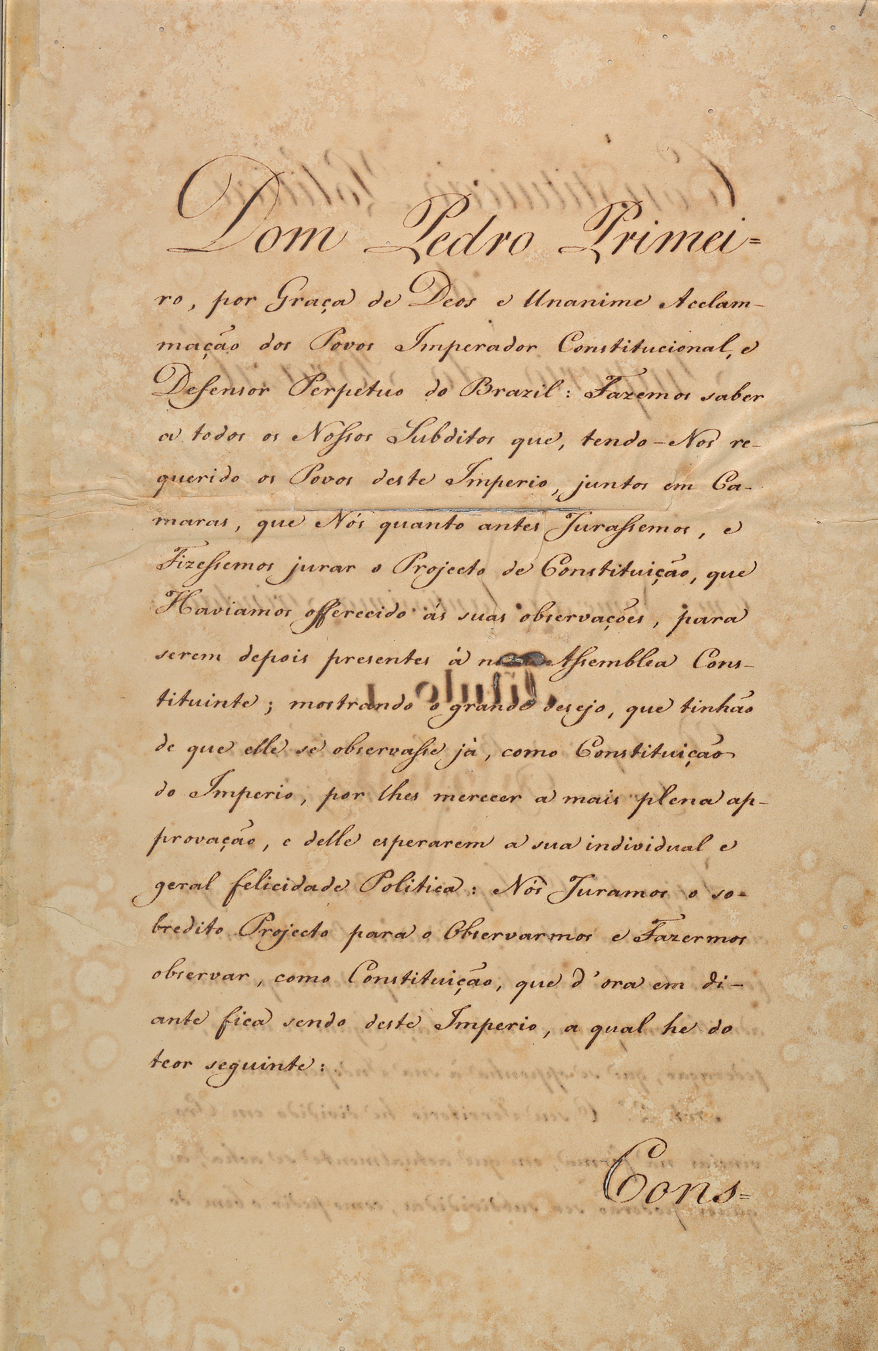 1ª página da Constituição do Império do Brasil, de 1824.